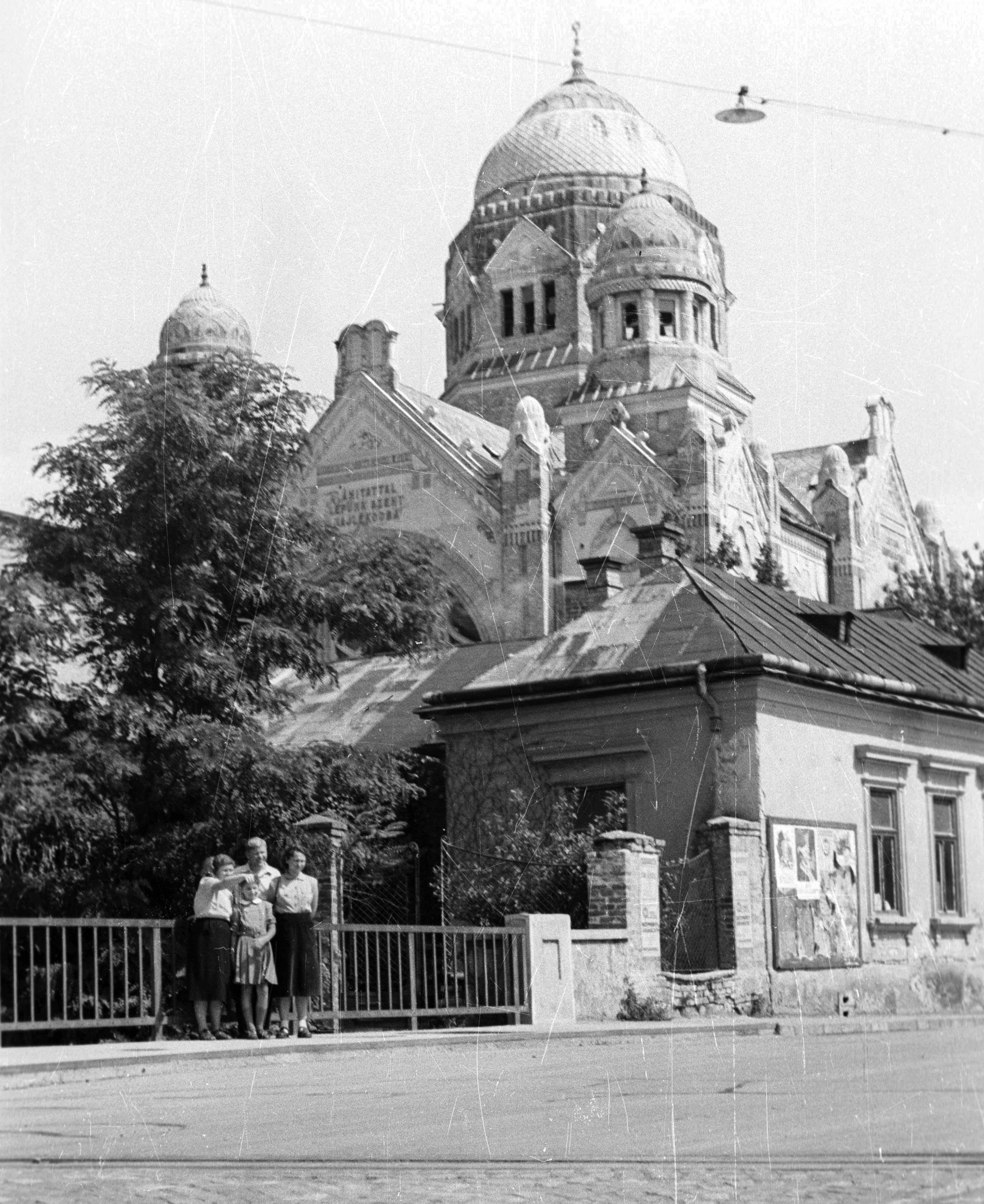 Kossuth utca, híd az Eger patak felett, szemben a régi Zsinagóga. Location: Hungary, Eger Tags: synagogue Title: Kossuth utca, híd az Eger patak felett, szemben a régi Zsinagóga.